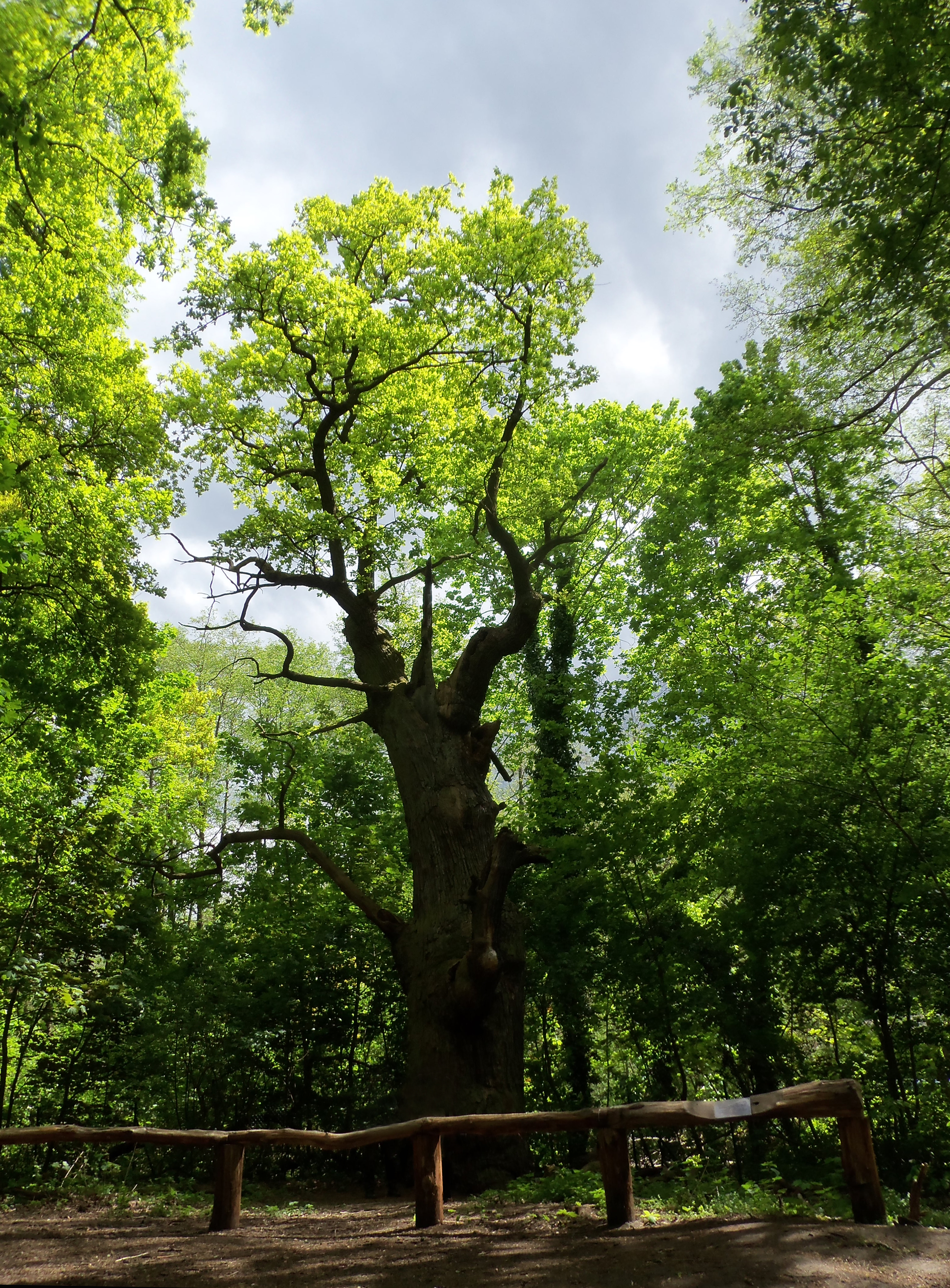 Die Dicke Marie ist eine Stieleiche (Quercus robur) im Berliner Ortsteil Tegel, ist ein eingetragenes Naturdenkmal. Sie ist vermutlich der älteste Baum der Stadt.